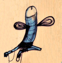 Caralho de asas, graffiti by Cranio in a wall in Tucuruvi, São Paulo, Brasil